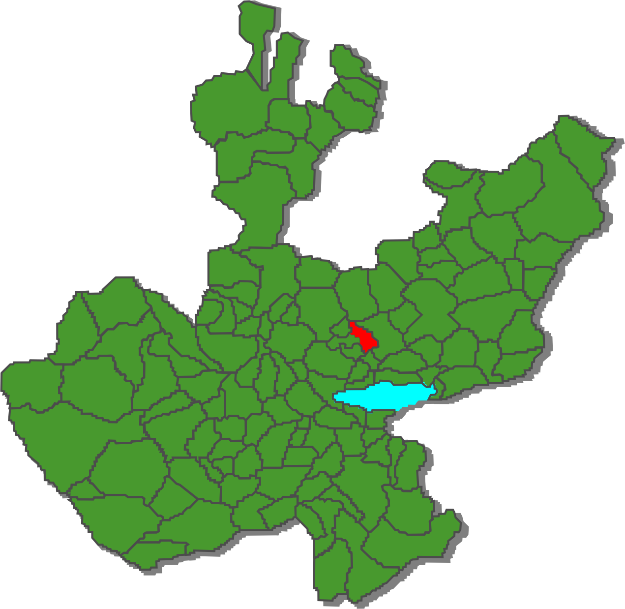 Mapa de ubicación del municipio de Tonalá en Jalisco.